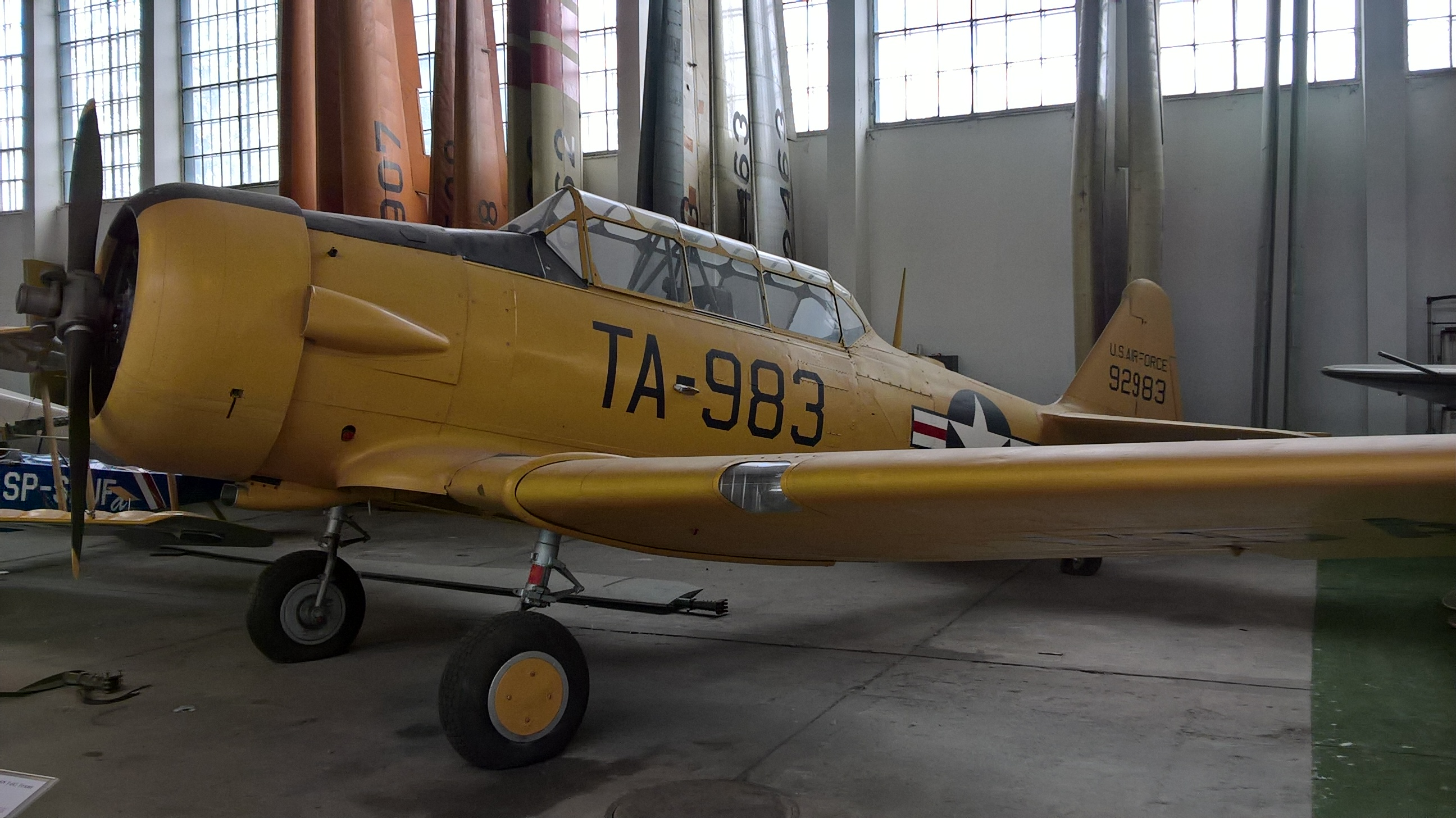 Amerykański samolot szkolno-treningowy North American T-6G Texan z 1949 r., eksponowany w Muzeum Lotnictwa Polskiego w Krakowie.